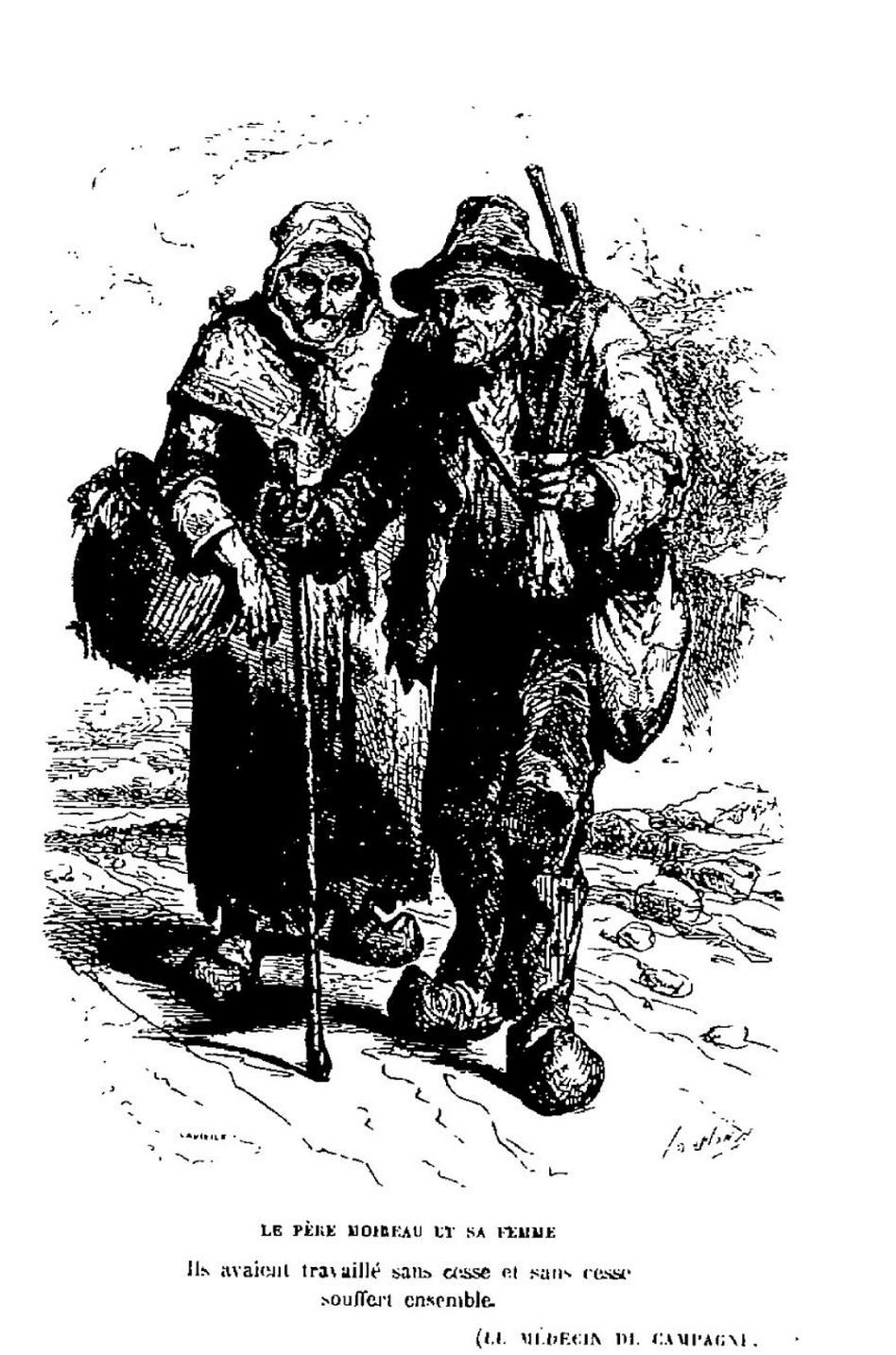 Dessin de deux paysans dans Le Médecin de campagne